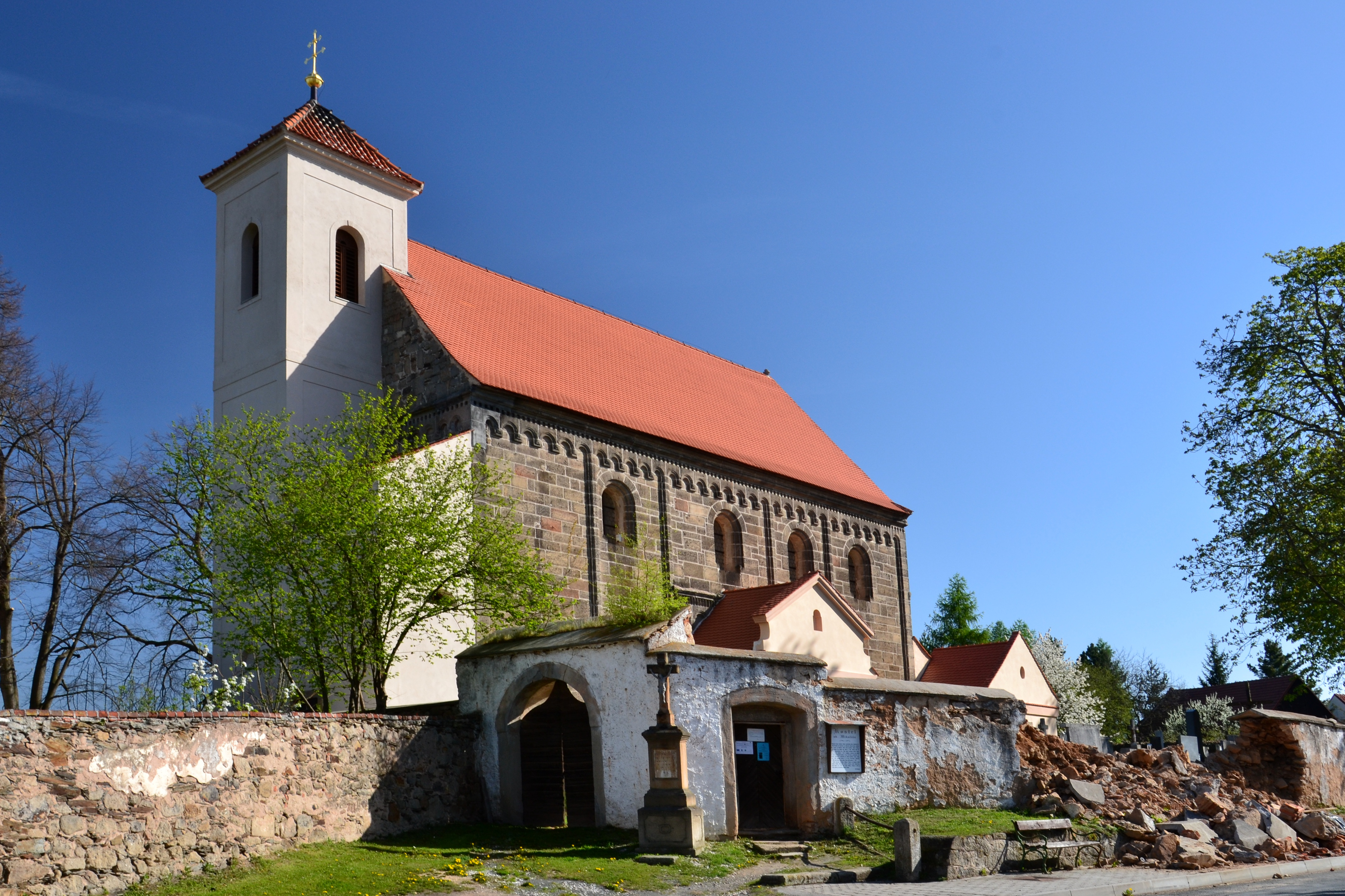 Kostel sv. Mikuláše (Potvorov), Potvorov